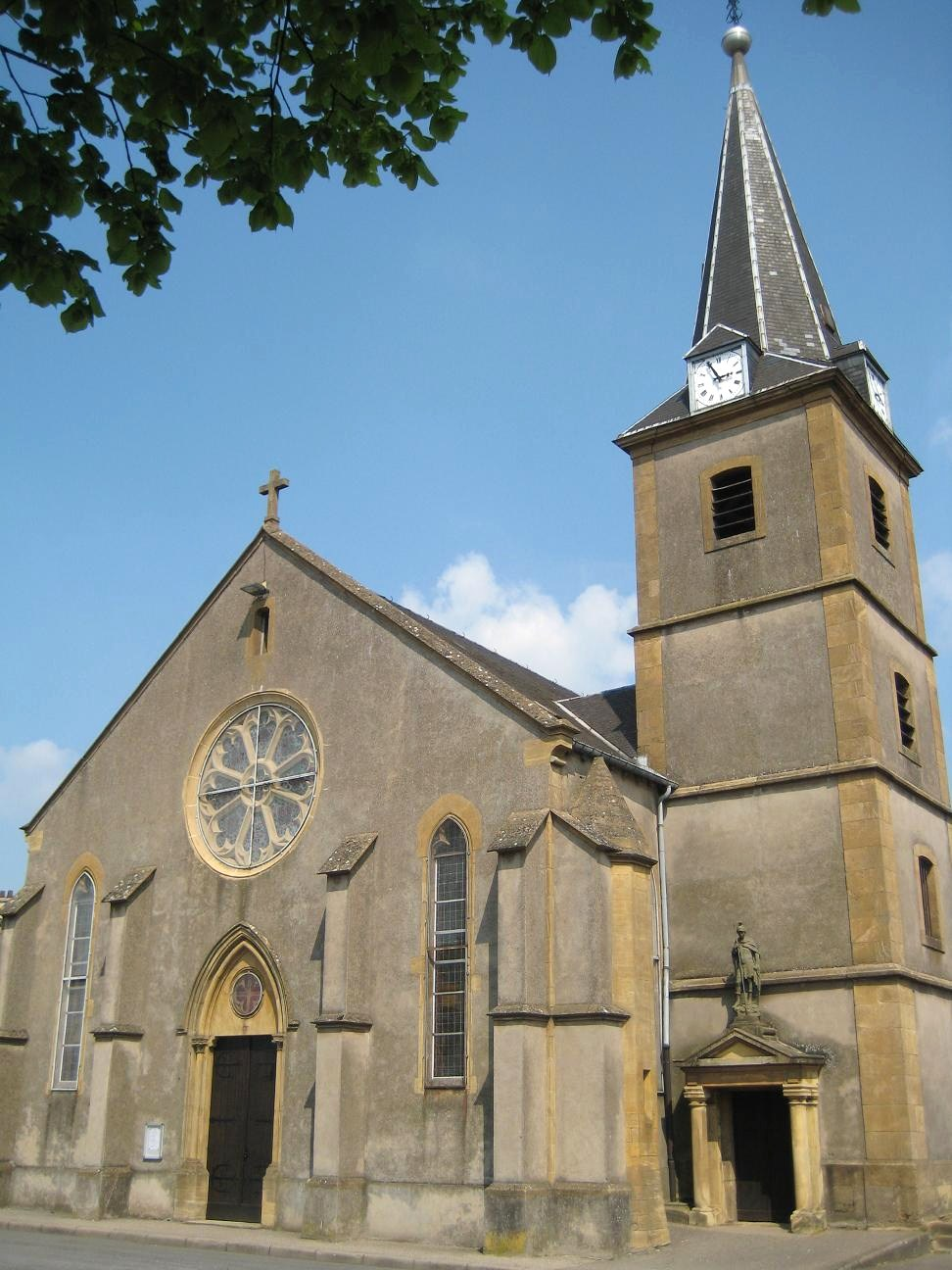 Eglise de Richemont